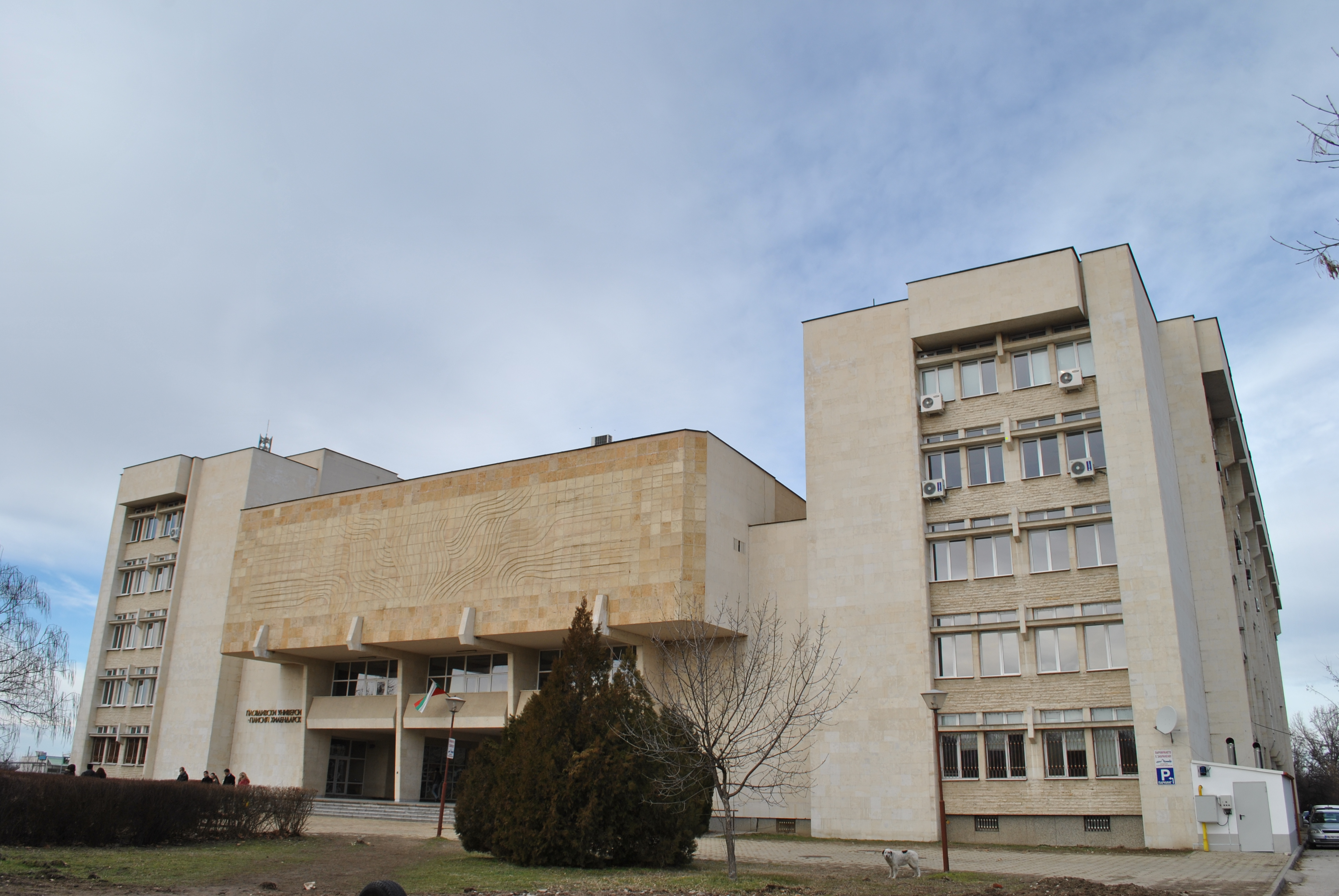 Сградата на пловдивски университет "Паисий Хилендарски", Пловдив, България